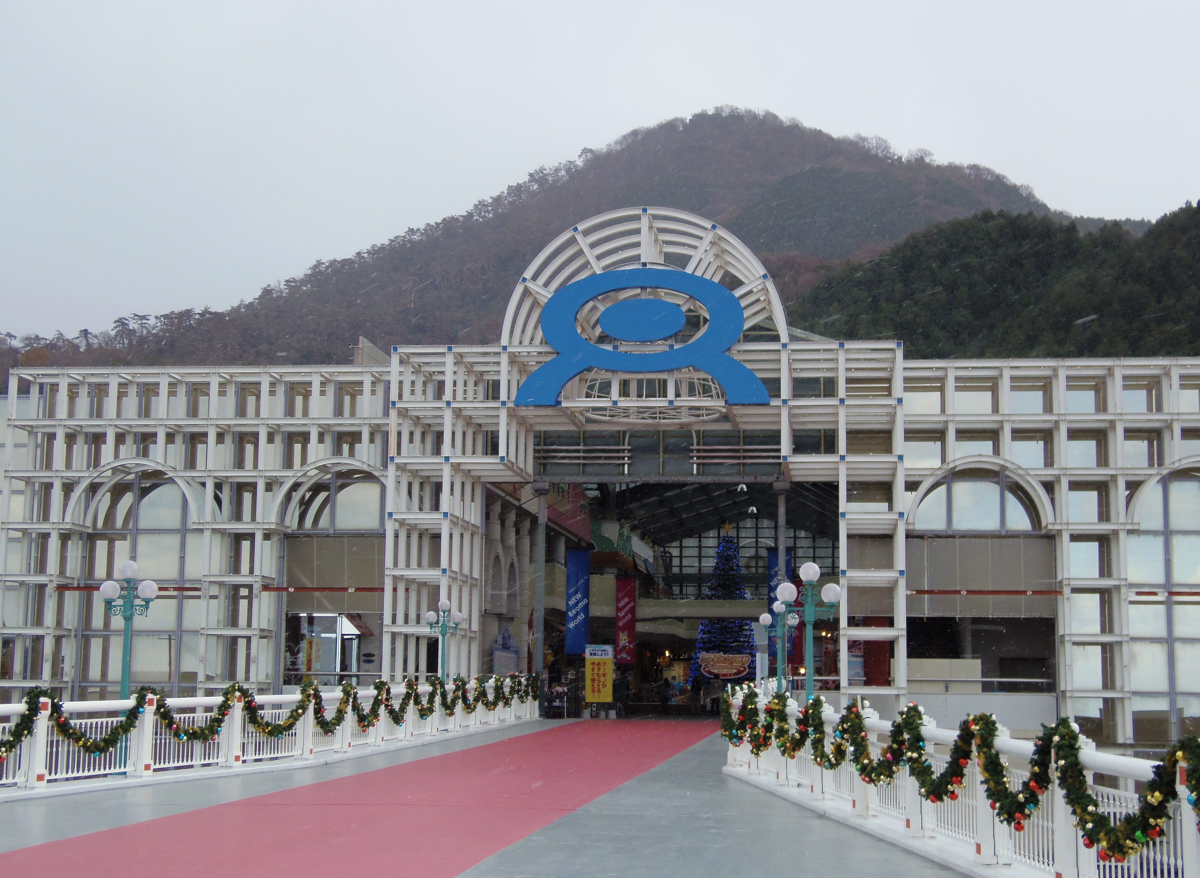 香川県丸亀市綾歌町にあるNEWレオマワールドのウェルカムプラザ外観